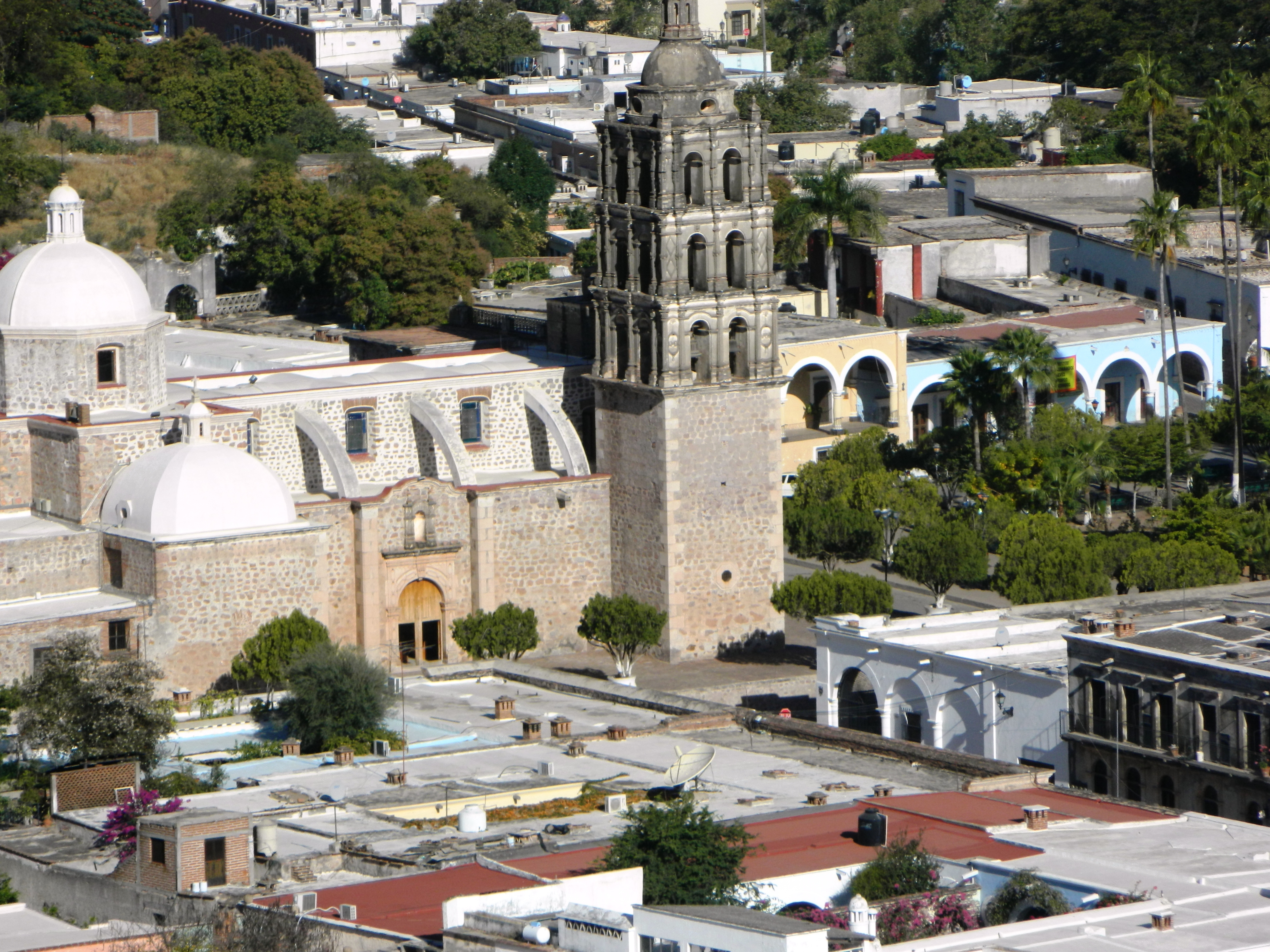 Iglesia de Almos, Sonora vista desde el Mirador de Alamos